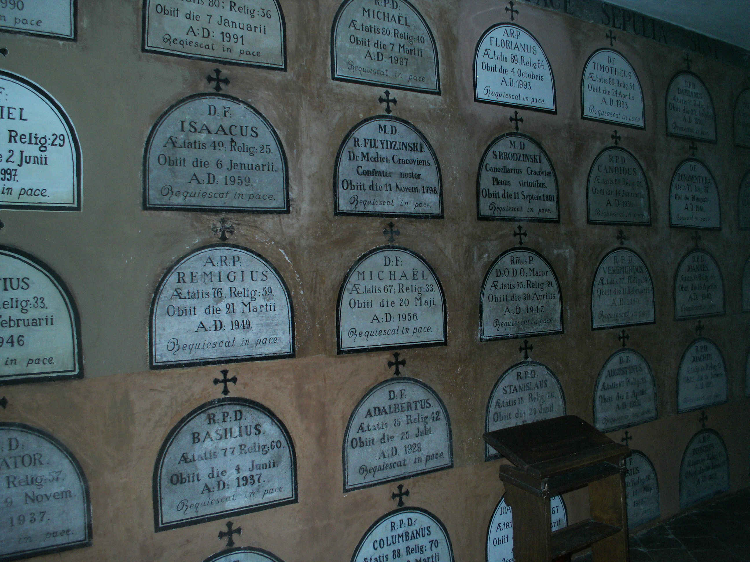 Zdjęcie katakumb kamedulskich na Bielanach